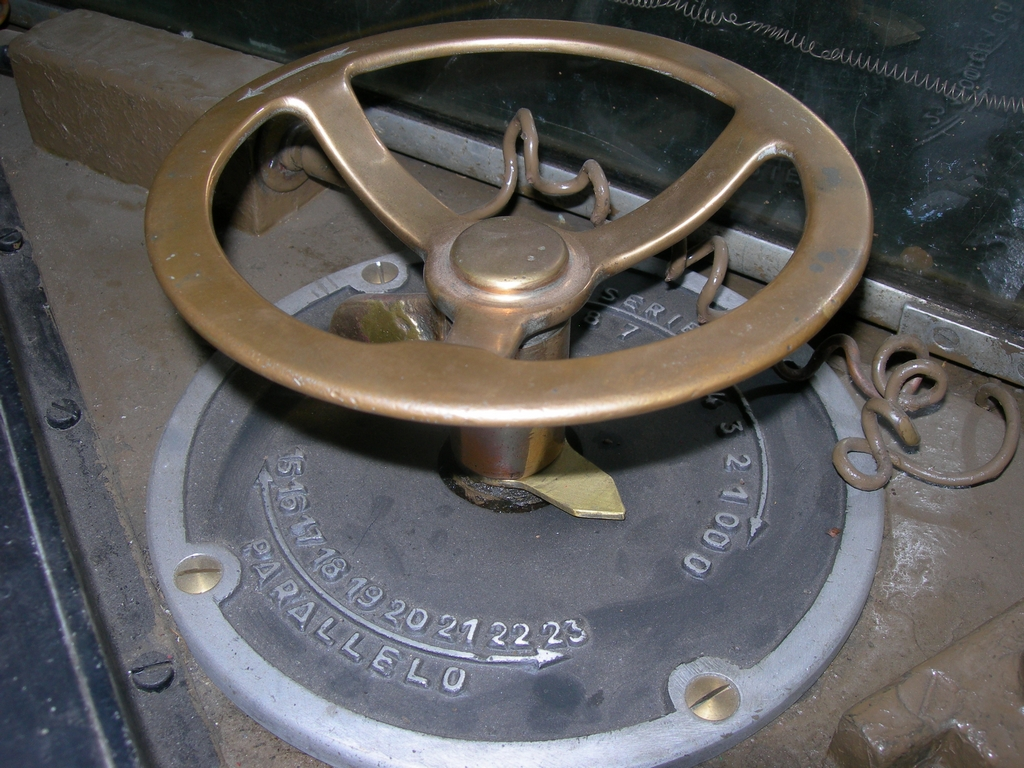 Volantino dell'avviatore automatico in uso sulle locomotive E424